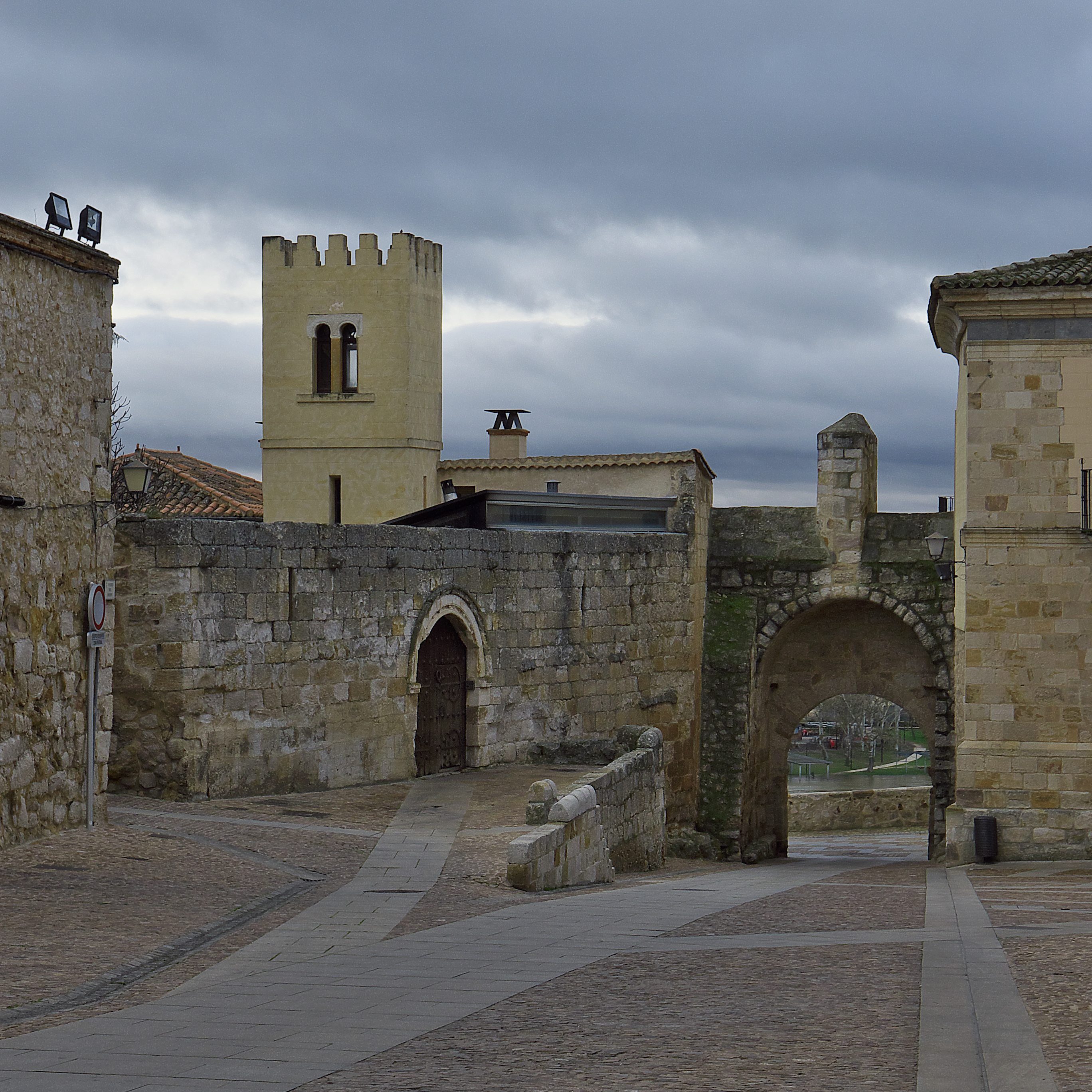 Interior de la Puerta del Obispo. Una de las puertas más antigua de la ciudad. Finales del siglo X.